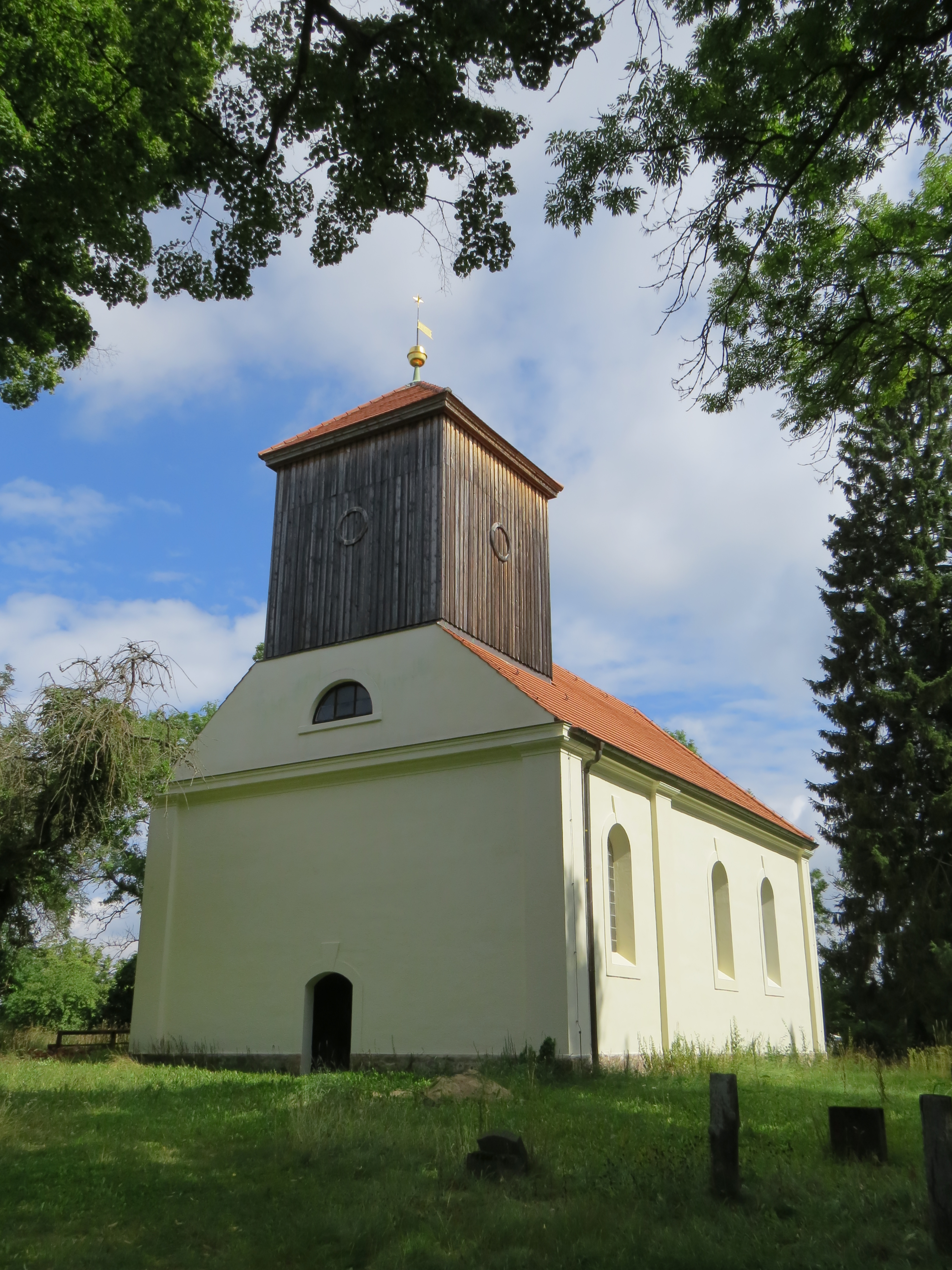 Lychen, Ortsteil Küstrinchen, Kirche